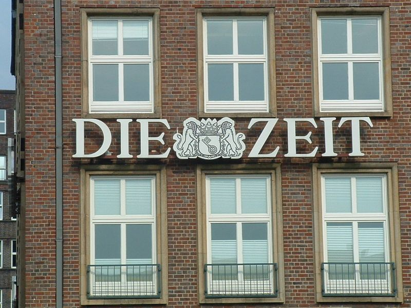 Logo der Wochenzeitung "Die Zeit" am Pressehaus in Hamburg This is a photograph of an architectural monument.